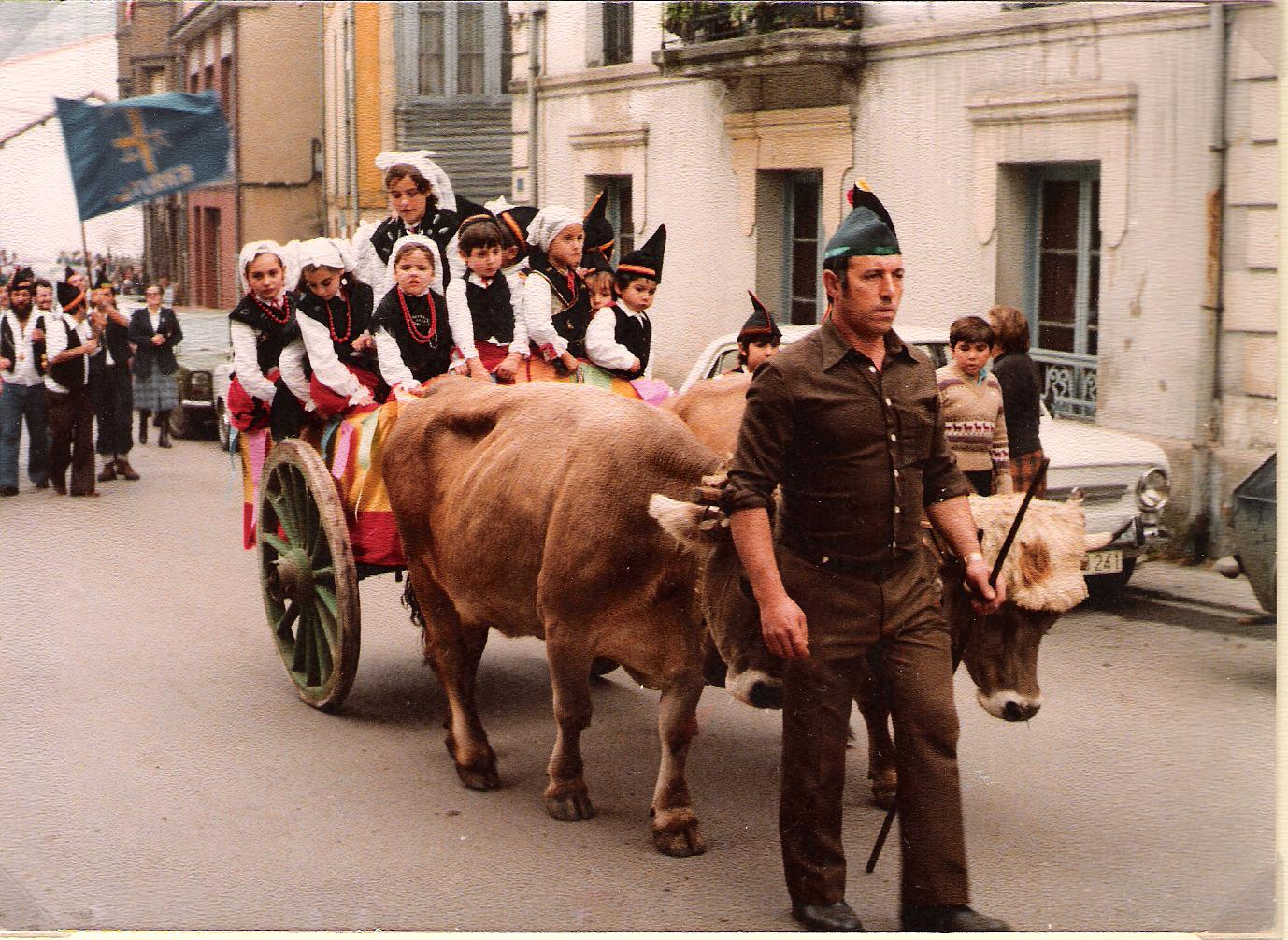 En la imagen hay dos bueyes dirigidos por un hombre vestido tradicionalmente y estos llevan a niños en un carro vestidos tradicionalmente Asturianos